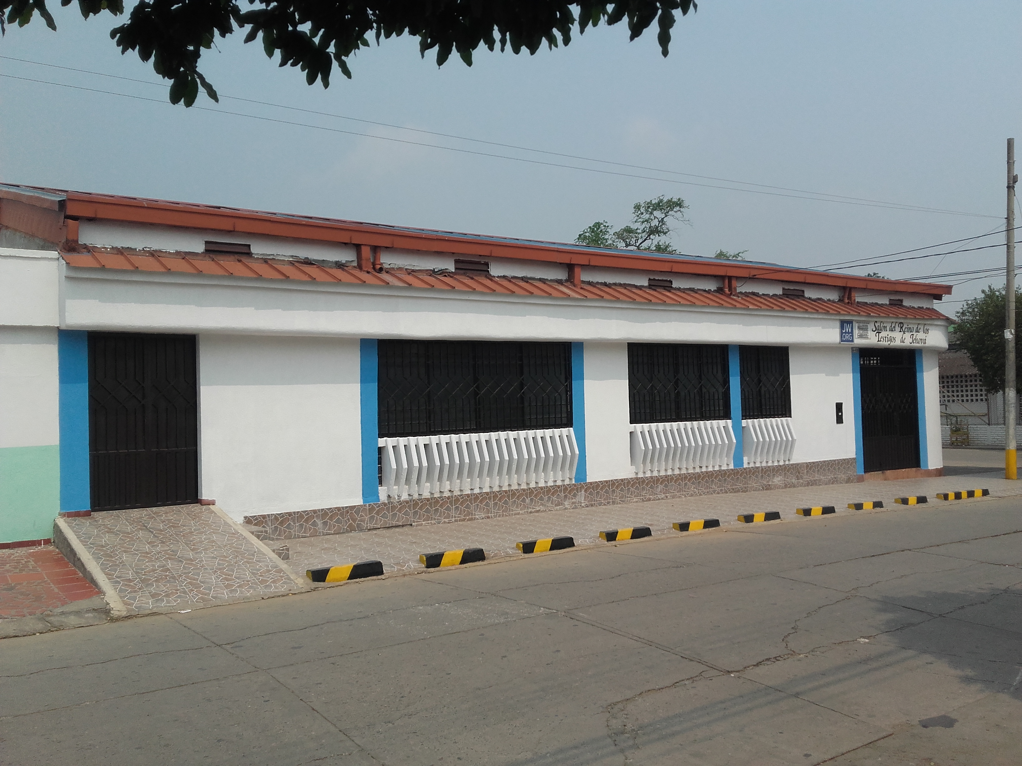 Iglesia Testigos